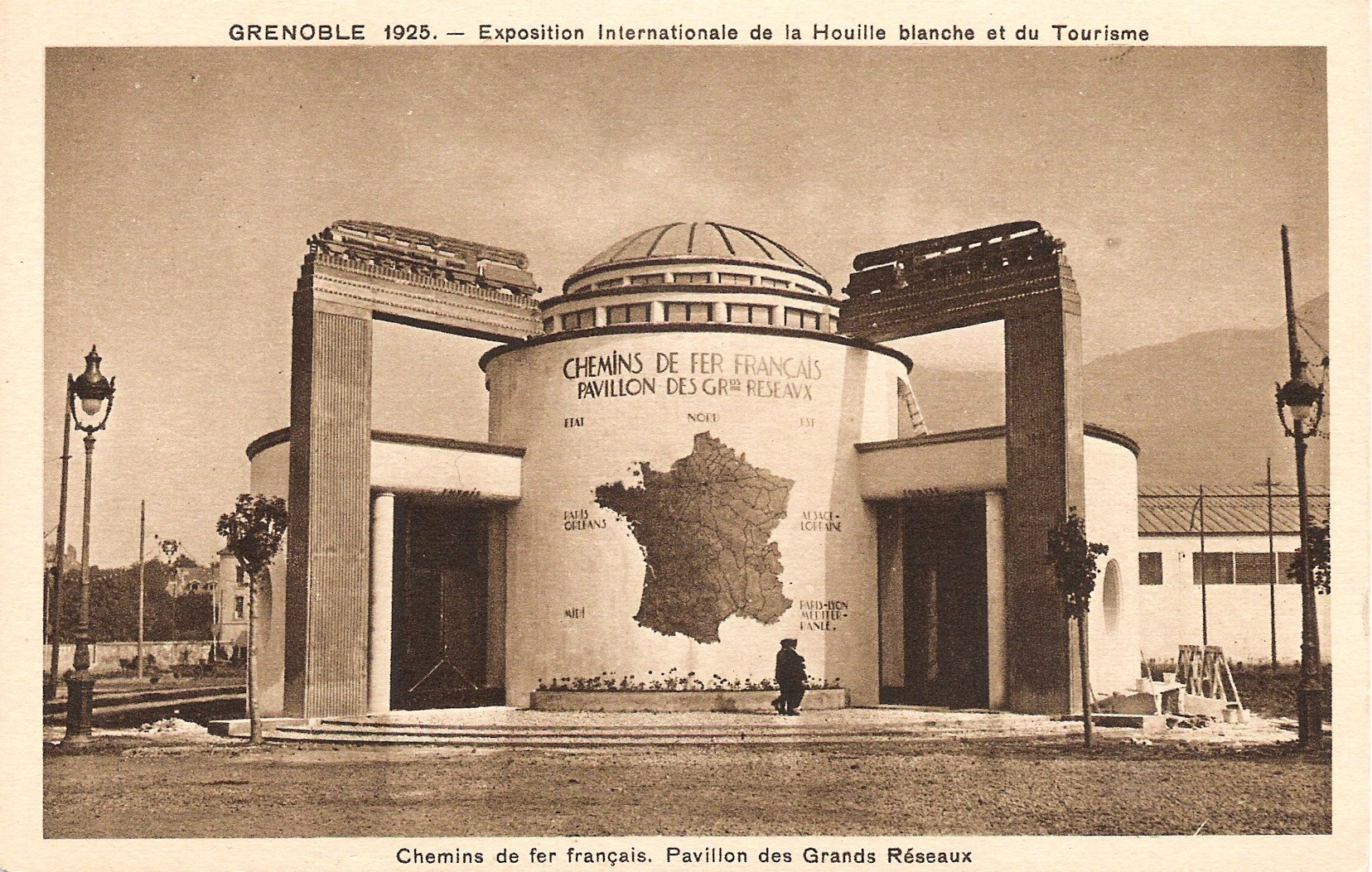 Palais des chemins de fer, pavillon des grands réseaux. Exposition internationale de la houille blanche et du tourisme, Grenoble 1925.